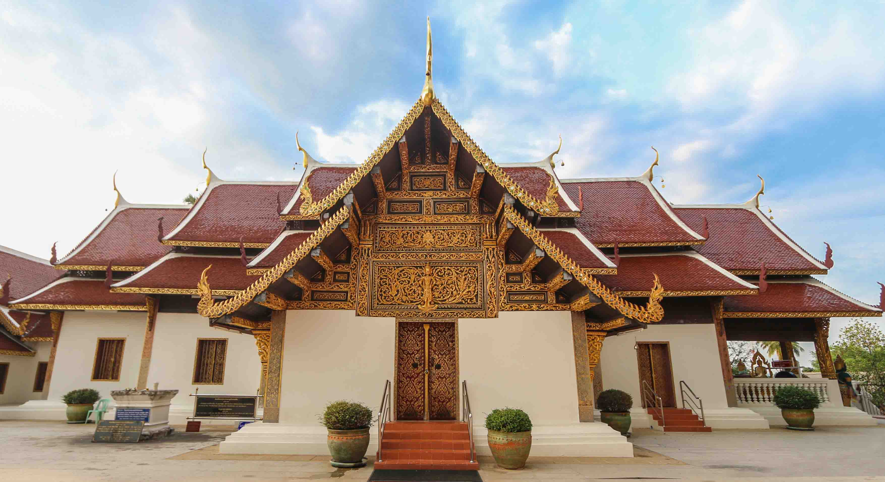 วัดพระธาตุศรีจอมทอง